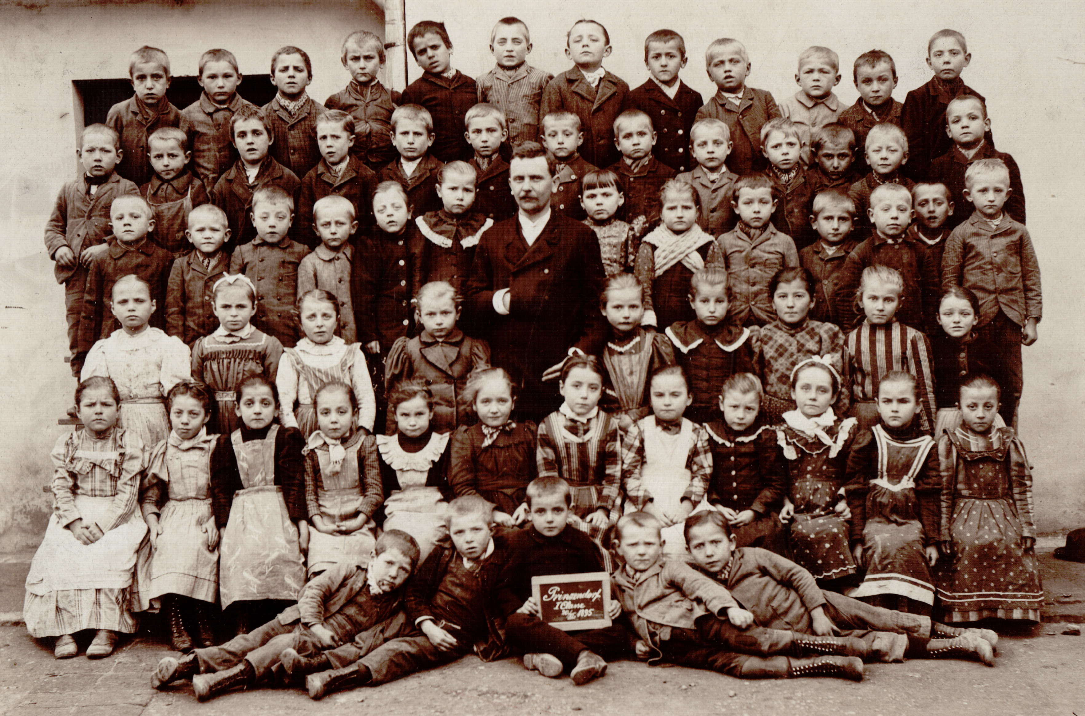 Erste Klasse der Volksschule von Prinzendorf aus dem Jahre 1895 voraussichtlich mit Herma Seyffarth, beschriftet aber mit Seifart